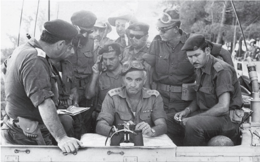 אל"מ אורי בן-ארי בזחל"ם הפיקוד של חטיבת הראלבמלחמת ששת הימים